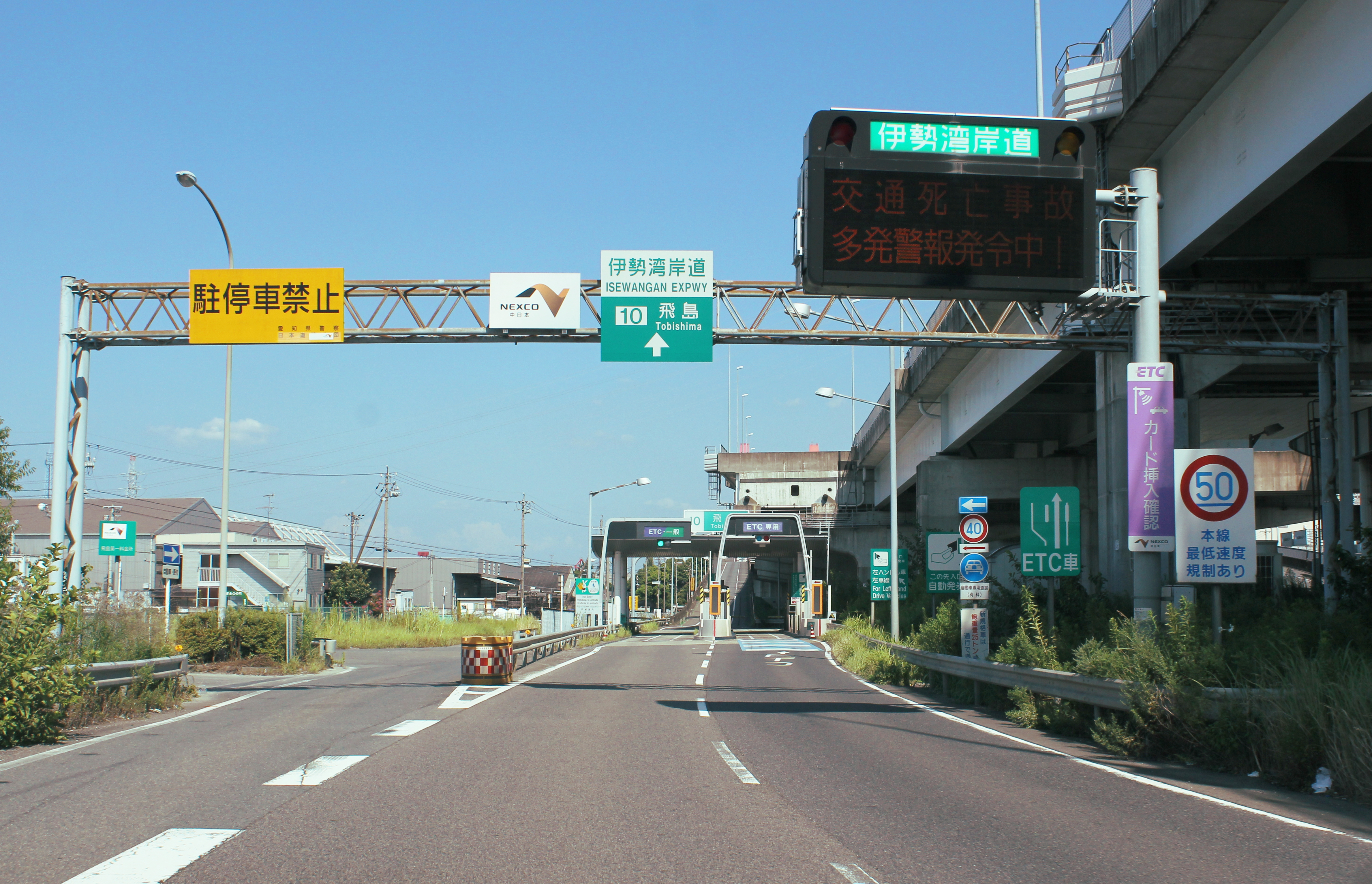 伊勢湾岸自動車道 飛島IC